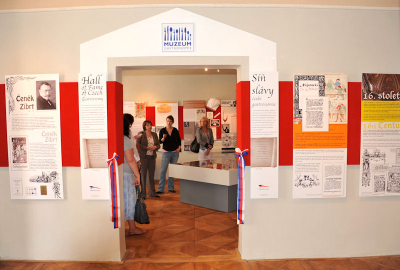 Síň slávy české gastronomie